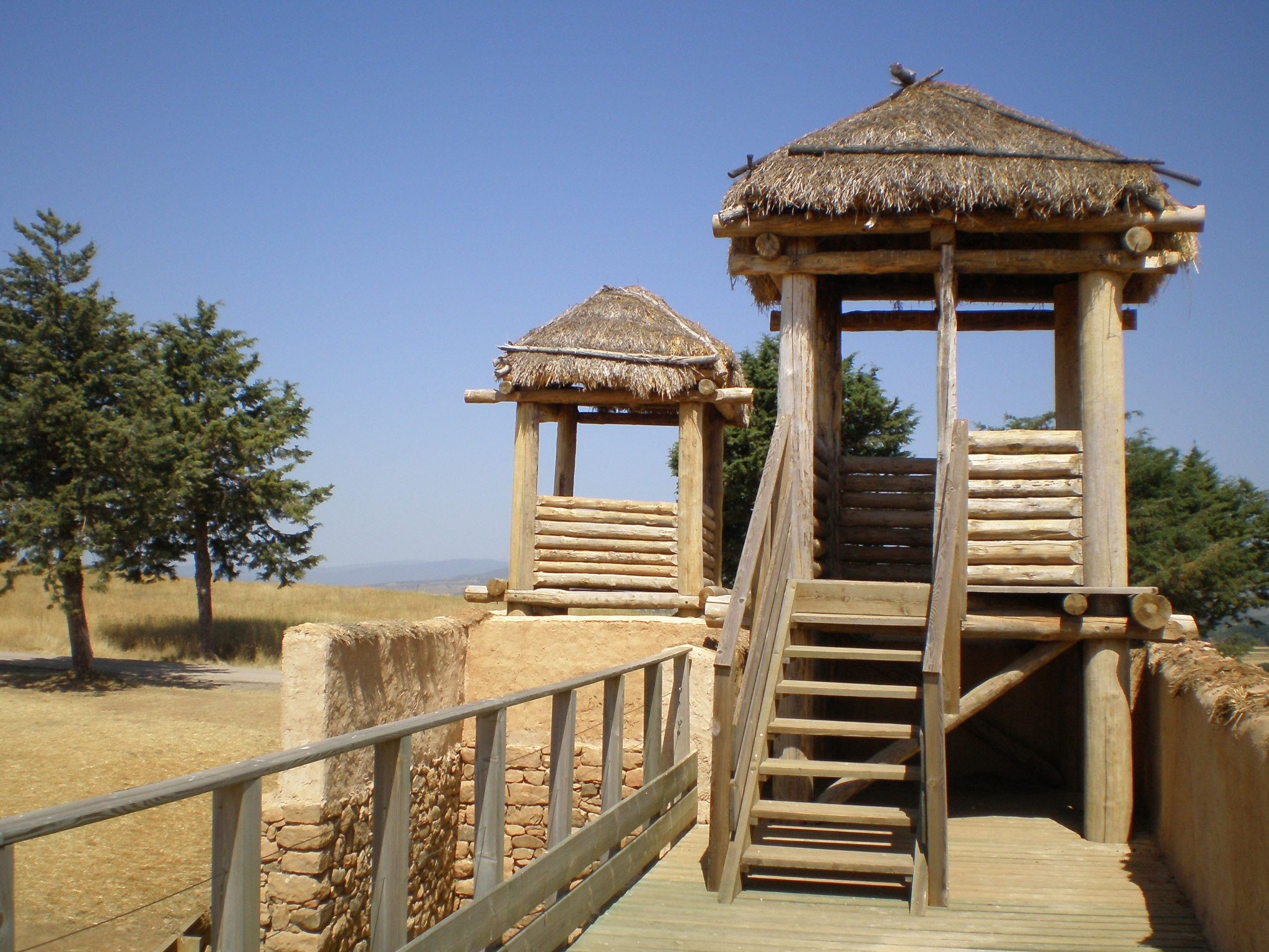 Numancia (Soria, Spain)